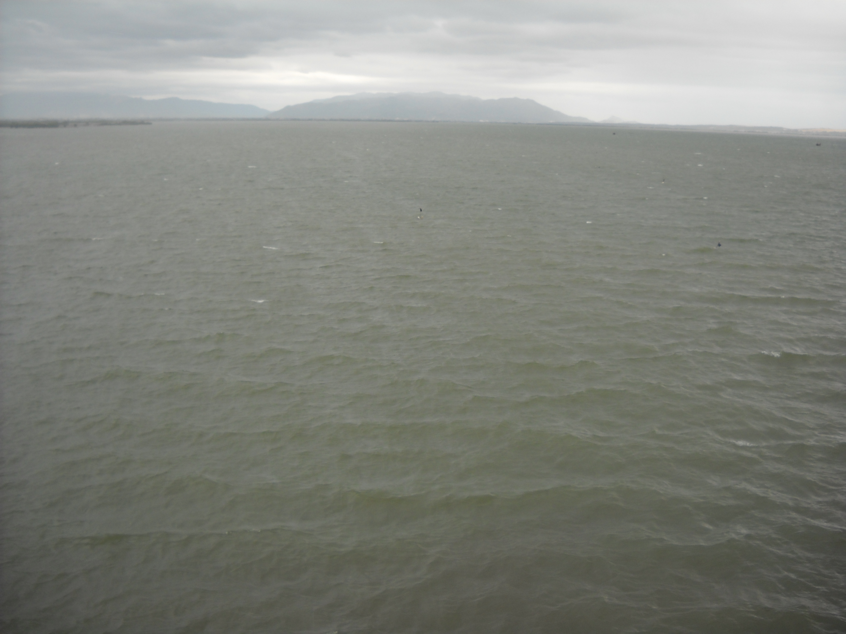 Đầm Thị Nại, Quy Nhơn